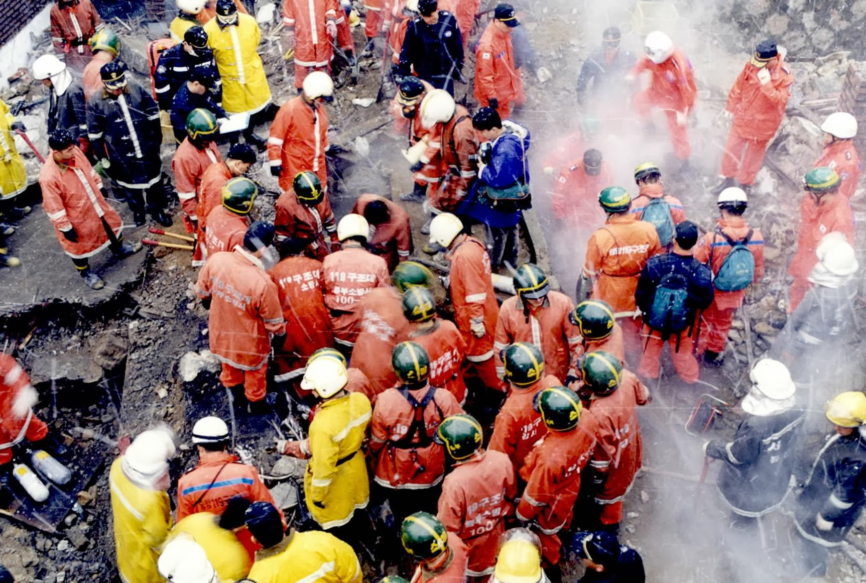 홍제동 화재 사고(弘濟洞火災事故)